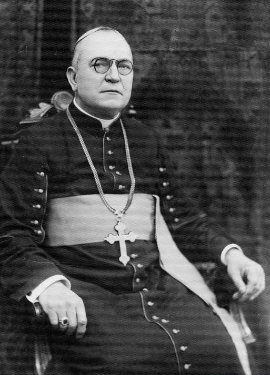 Biskup Włodzimierz Jasiński